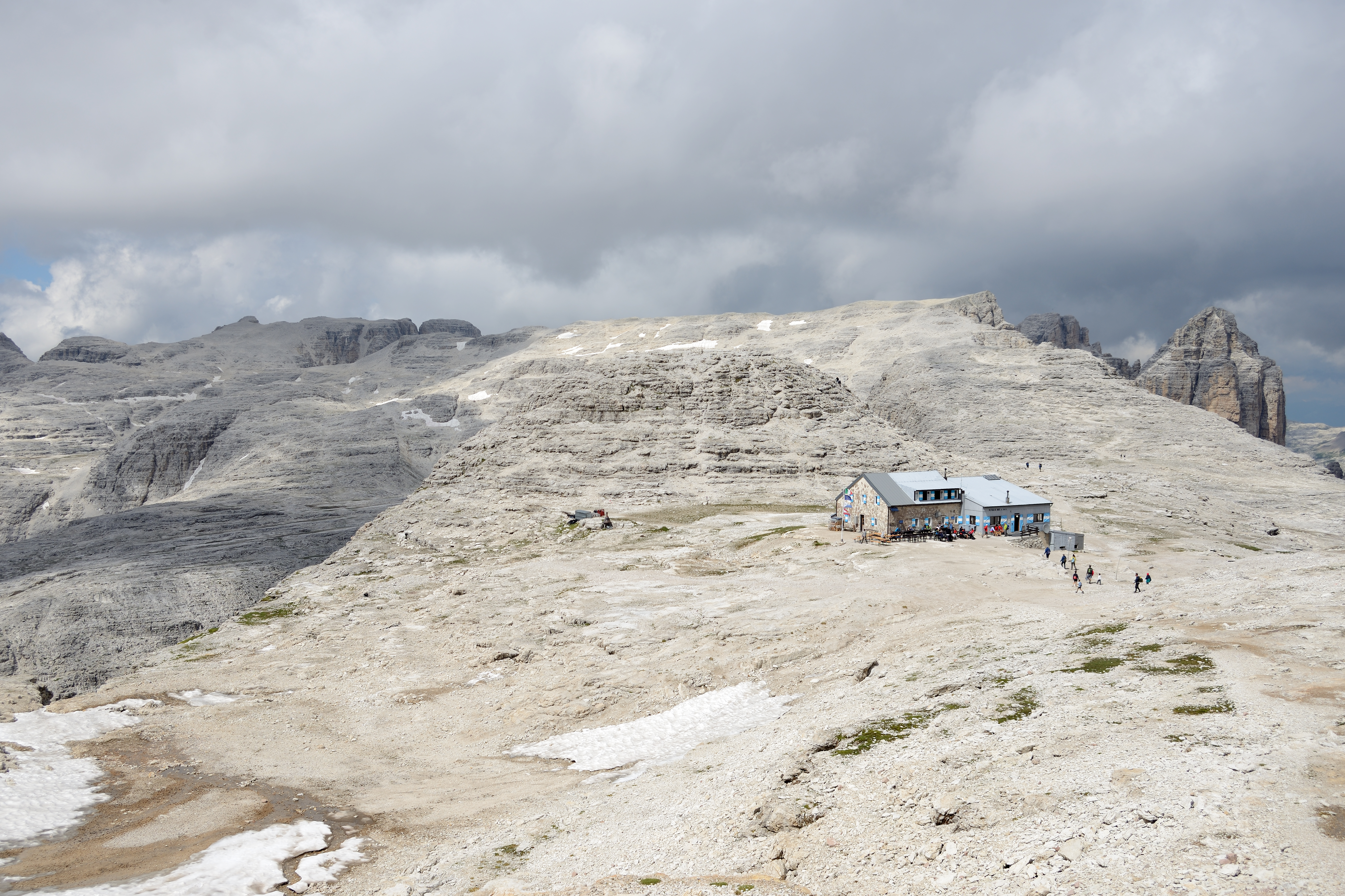 Rifugio Boè - Col Turond, Canazei, Trento, Italia